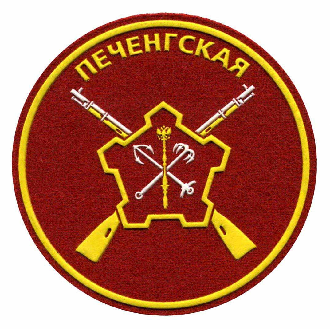 Нарукавный знак 200-й омсбр (Луостари)